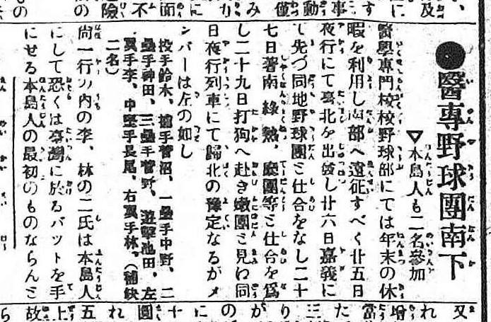 中文（台灣）: 1919-12-15